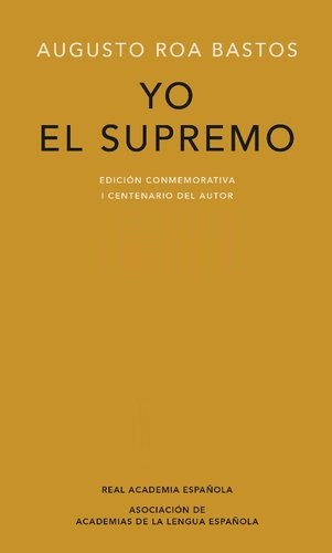 Versión simplificada de Yo el Supremo publicada por la Real Academia con motivo del centenario del nacimiento del autor.